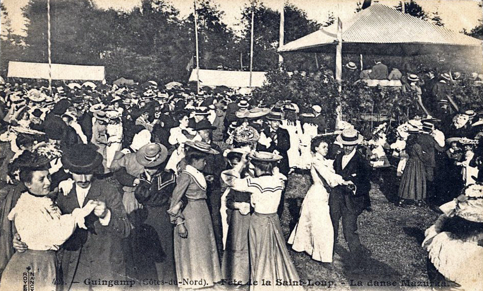 La danse Mazurka durant la Fête de la Saint-Loup.